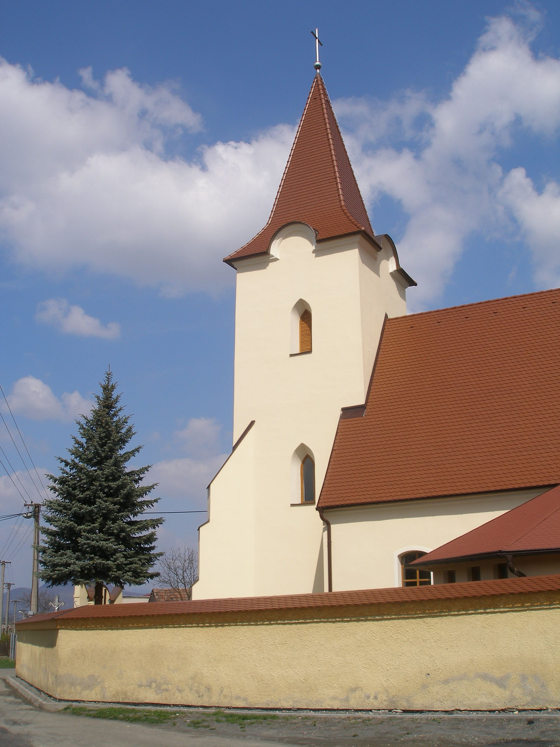 Obec Vyšná Šebastová okres Prešov, región Šariš